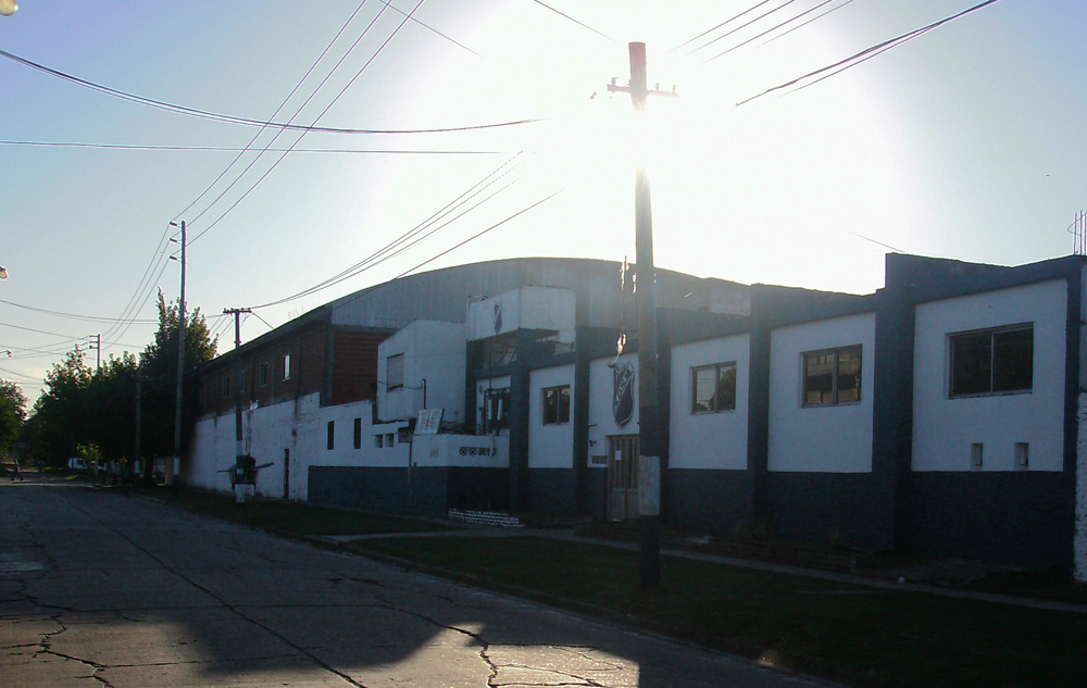 Sede CSDSM